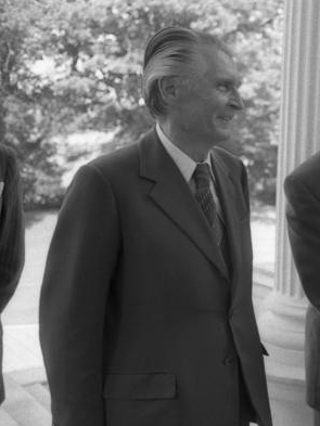 Title: Bonn, Scheel empfängt deutsche Botschafter Extra information: Von links: Erwin Wickert, daneben Günther Gaus und Walter Scheel People in the image: Scheel, Walter: Bundespräsident, Außenminister, Bundesminister für wirtschaftliche Zusammenarbeit, FDP, Bundesrepublik Deutschland (GND 118606751) * Gaus, Günter: Leiter der Ständigen Vertretung in der DDR, Bundesrepublik Deutschland * Wickert, Erwin: Botschafter in Großbritannien, Rumänien und China, Bundesrepublik Deutschland# (GND 118632264) Factual corrections and alternative descriptions are encouraged separately from the original description. Additionally errors can be reported at this page to inform the Bundesarchiv. Original historic description: Bundespräsident Walter Scheel empfängt die Teilnehmer der Botschafterkonferenz aus osteuropäischen Staaten im Bundespräsidialamt.